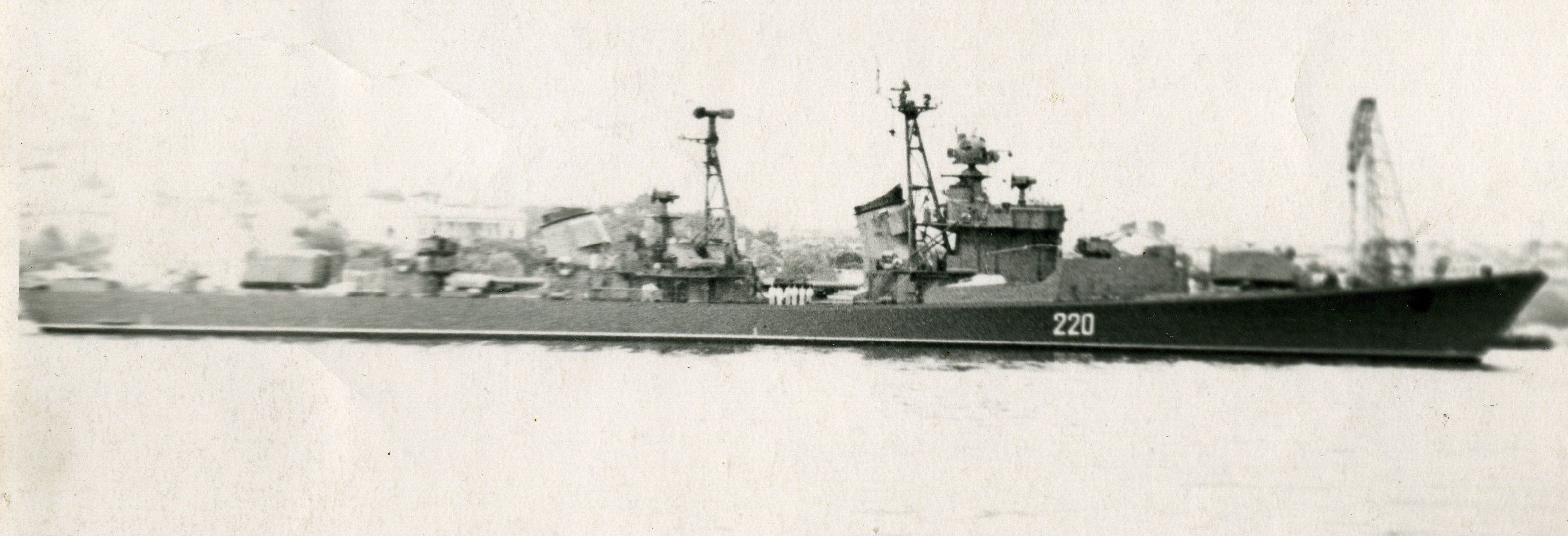 крейсер "Куйбышев" 1939 - 1965 год